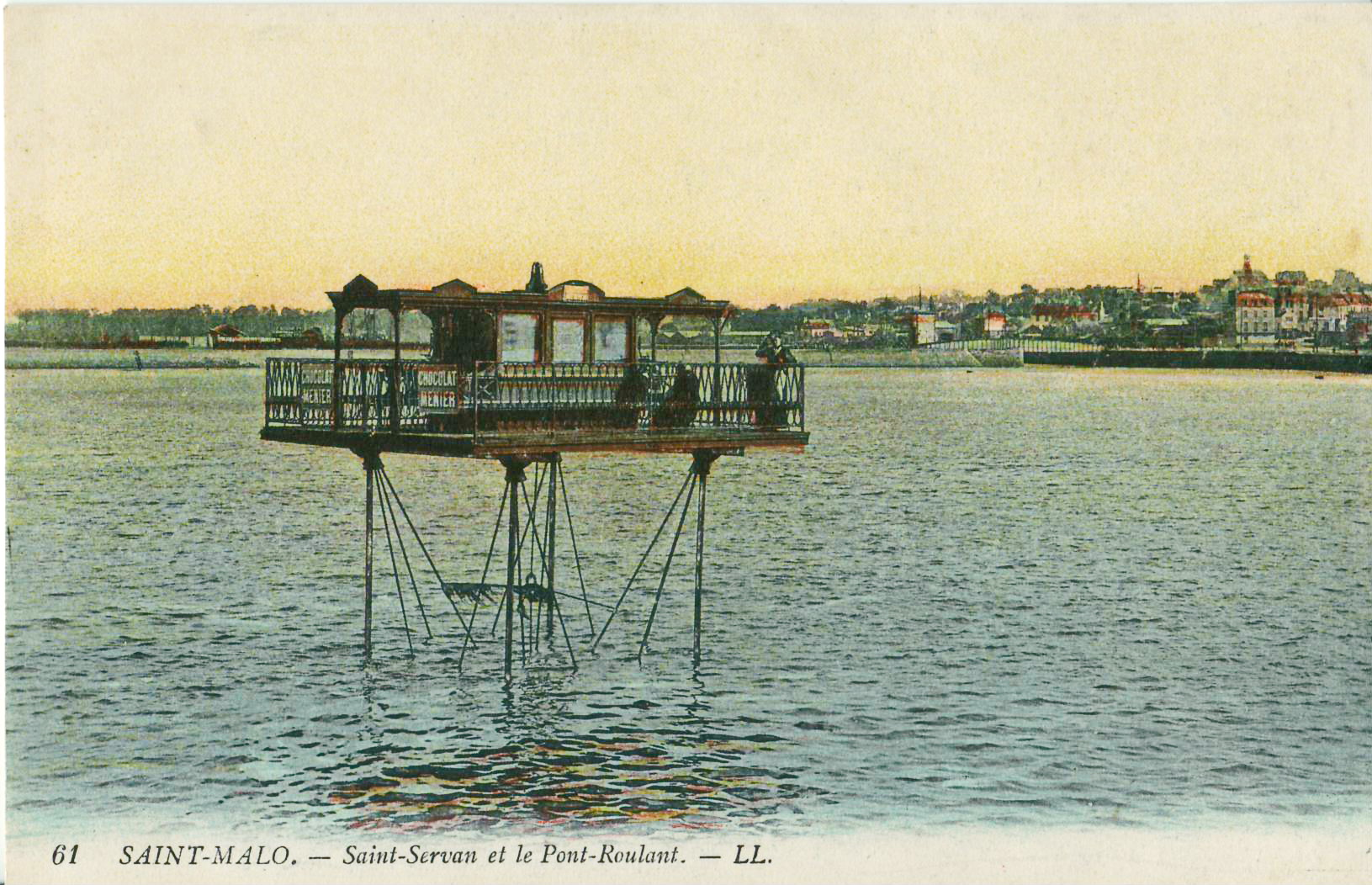 Carte postale ancienne éditée par LL, n°61 : SAINT-MALO - Saint-Servan et le Pont-roulant